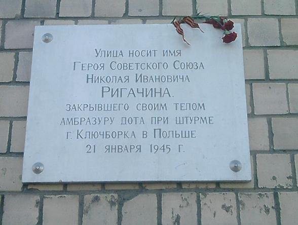 Памятная доска, Петрозаводск